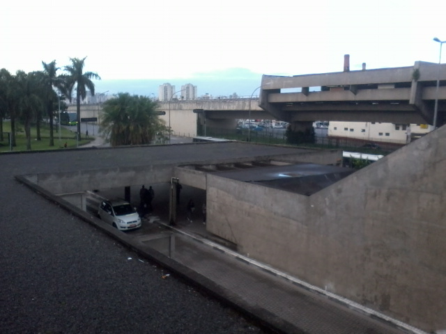 Exterior da Estação Portuguesa/Tietê